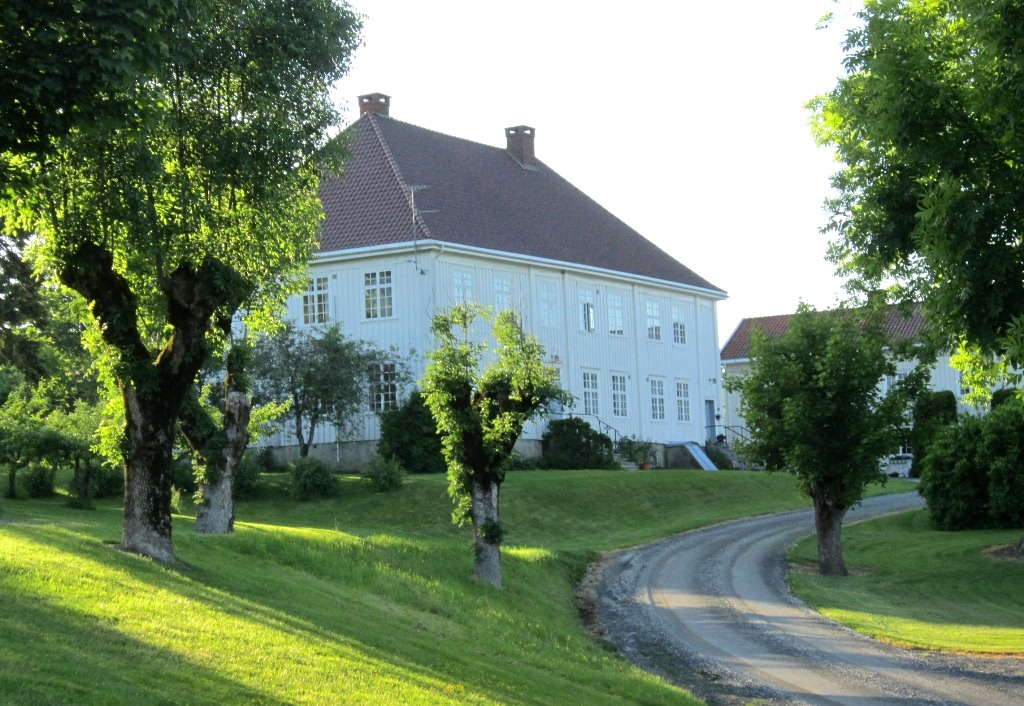 Frogner prestegård, Lier